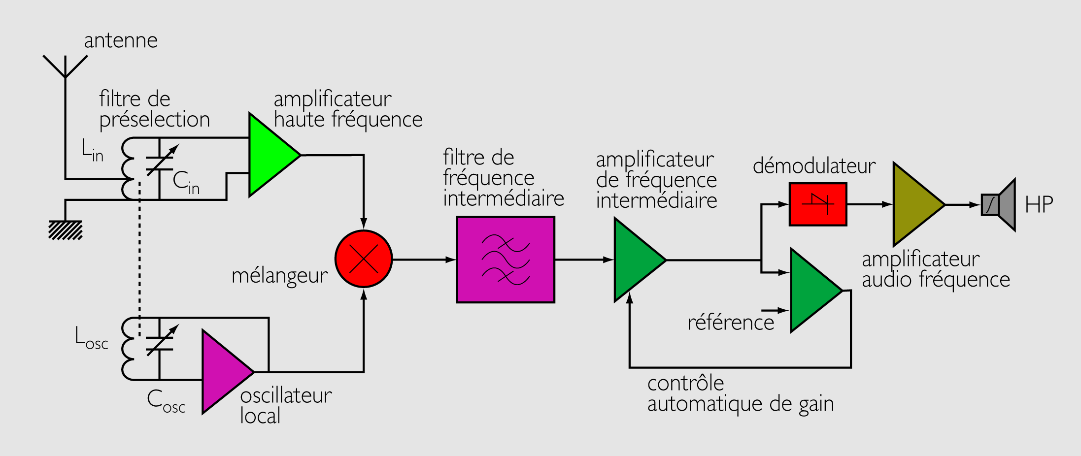 Blokschema superhet ontvanger